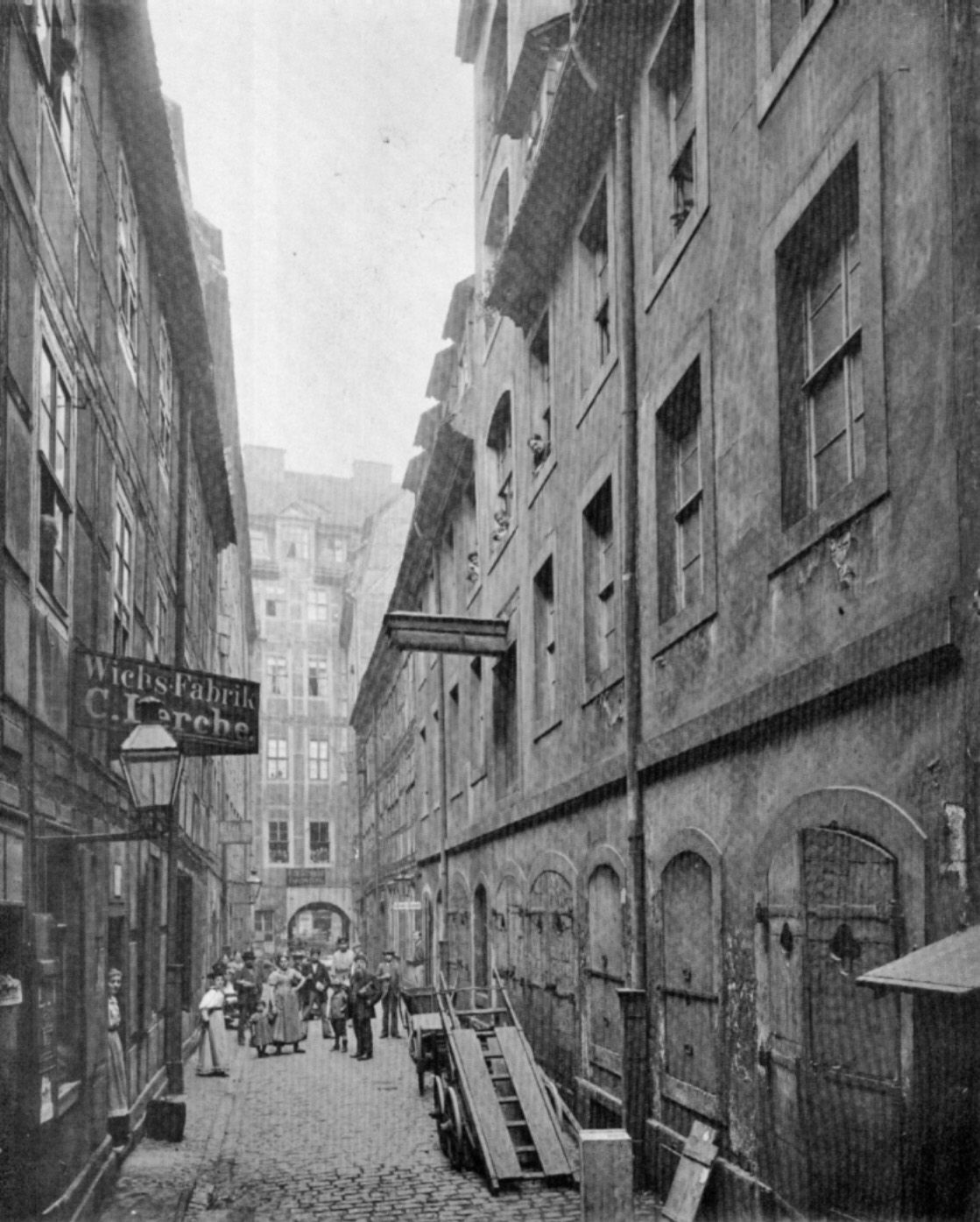 Quandts Hof in Leipzig, Ritterstraße Nr. 10 / Nikolaistraße Nr, 24 vor 1896. Dieser Hof musste dem Oelßners Hof weichen.